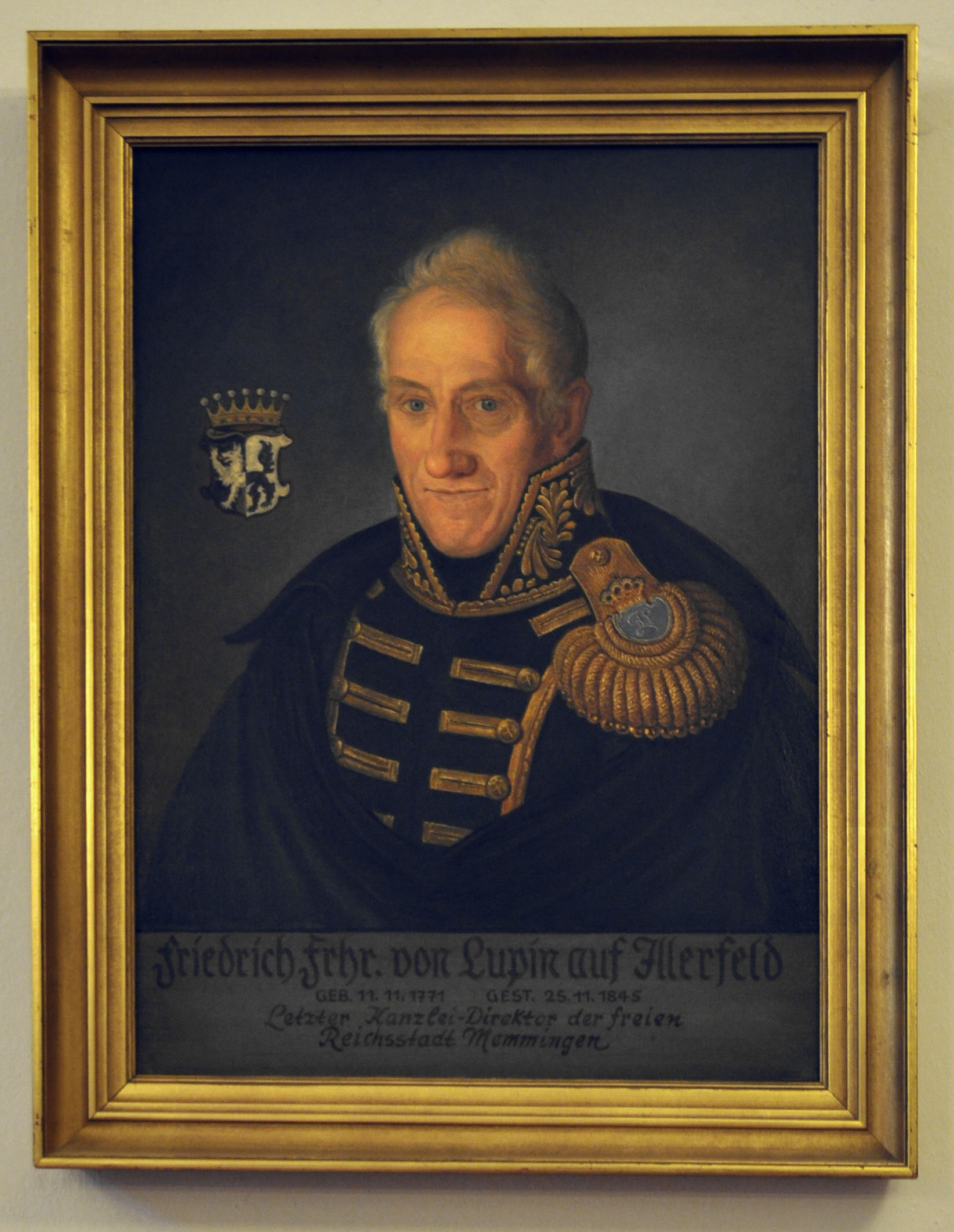 Memmingen, Rathaus, Sitzungssaal im Erdgeschoss, Portrait des Kanzleidirektors Friedrich von Lupin (1771–1845)